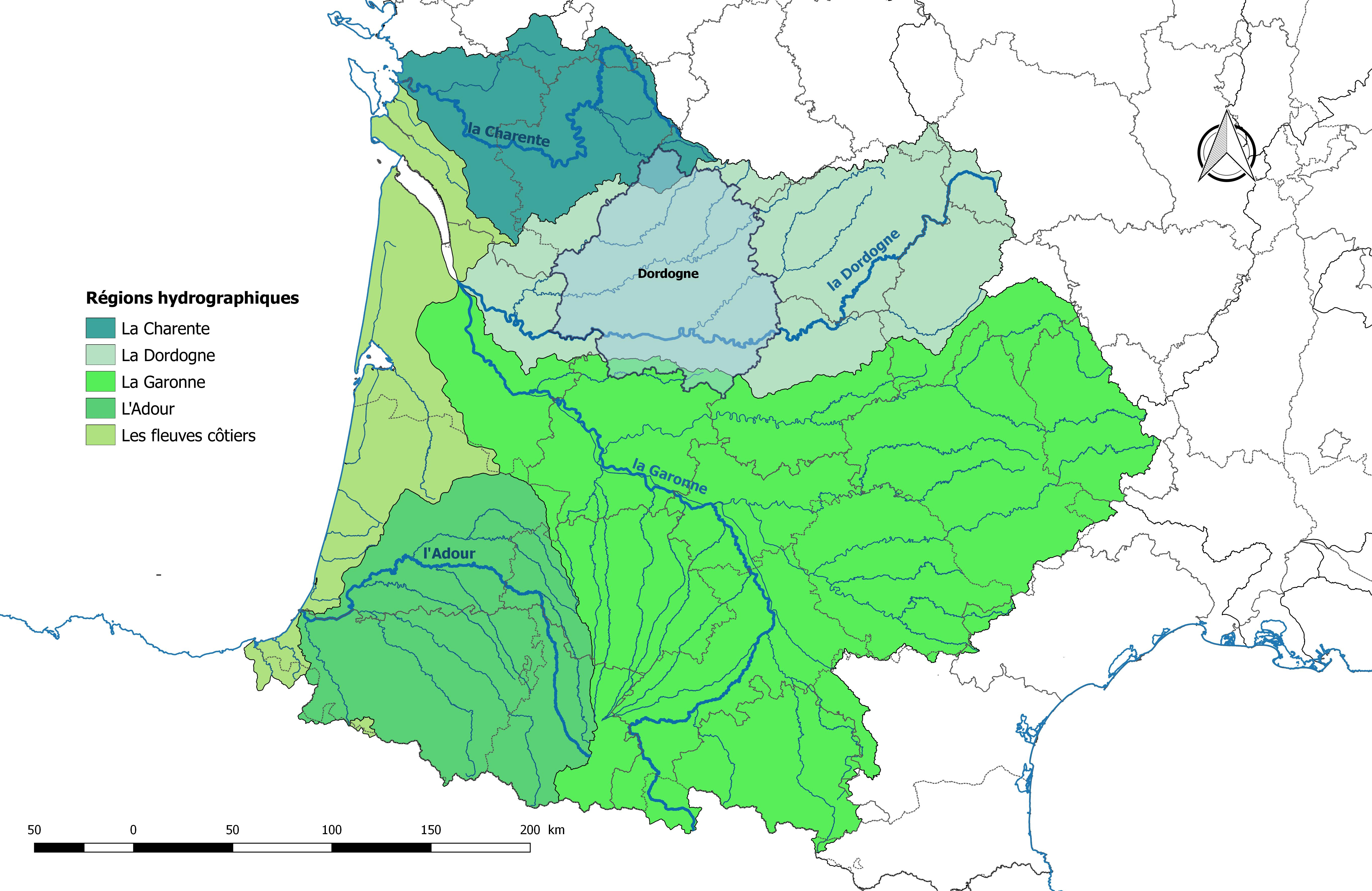 Découpage du bassin Adour-Garonne en régions hydrographiques, avec situation de la Dordogne